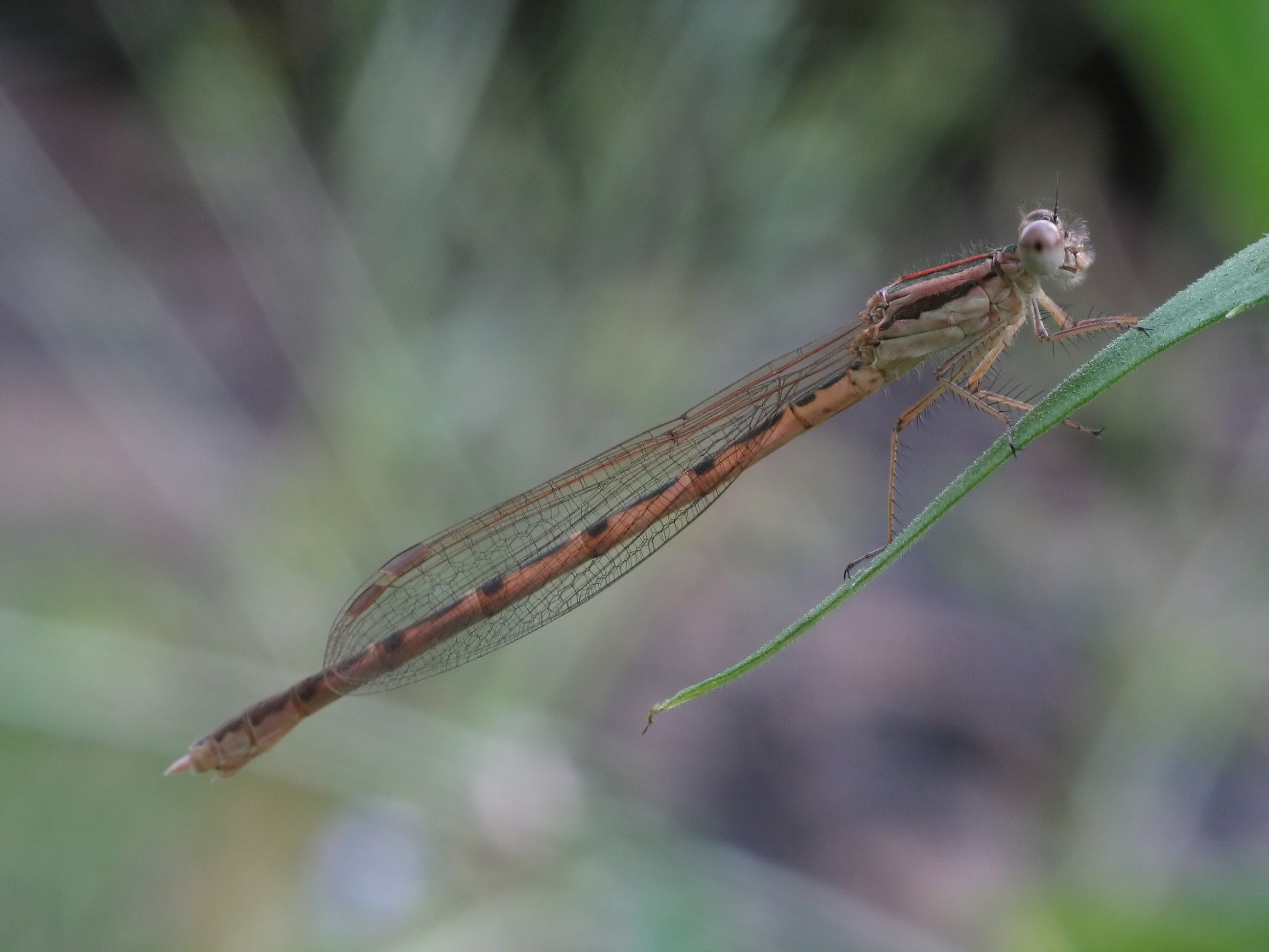 Sympecma fusca, location: Zabrze, Poland